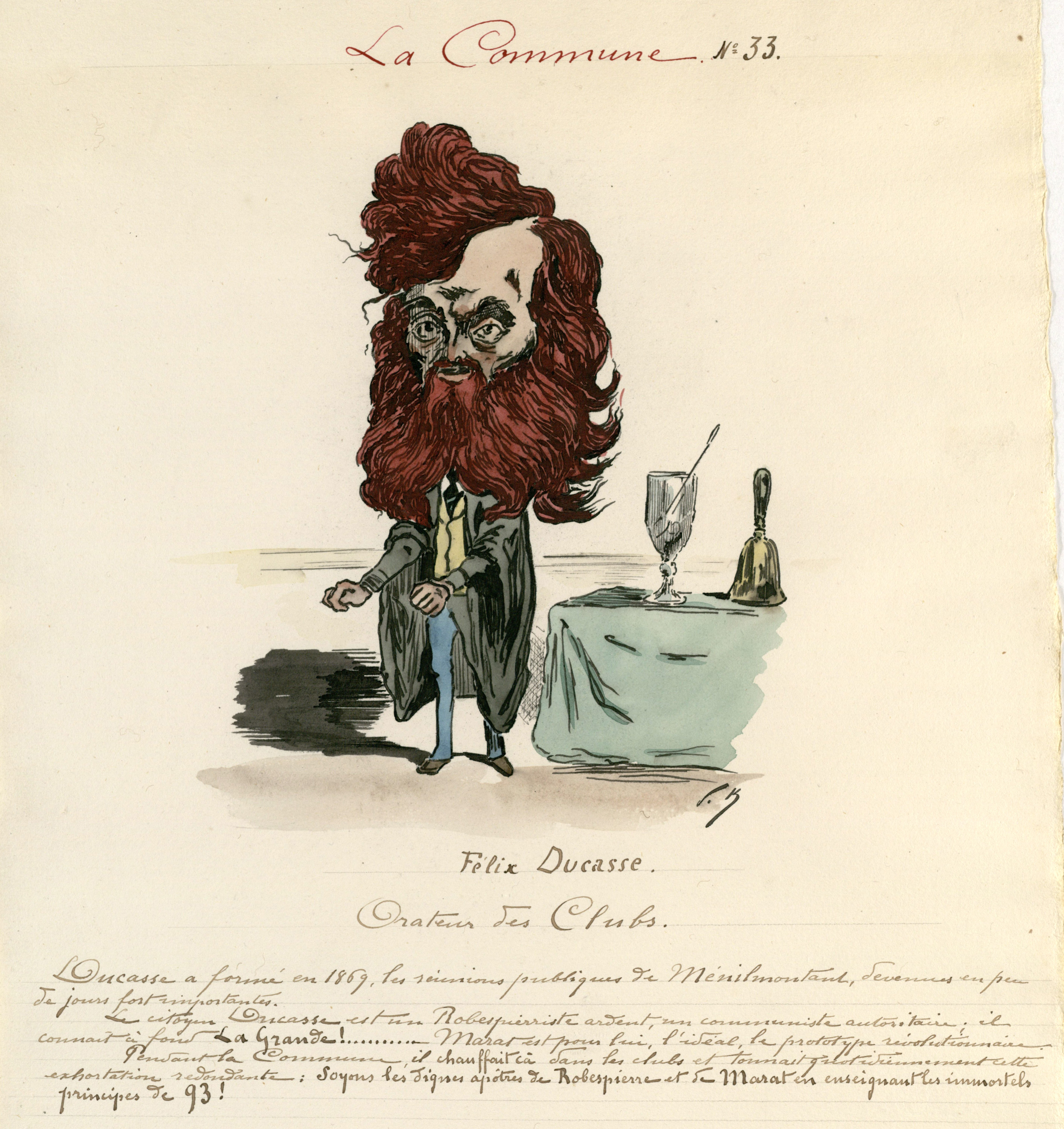 L'orateur Félix Ducasse représenté par Paul Klenck dans sa série La Commune, et description du personnage.